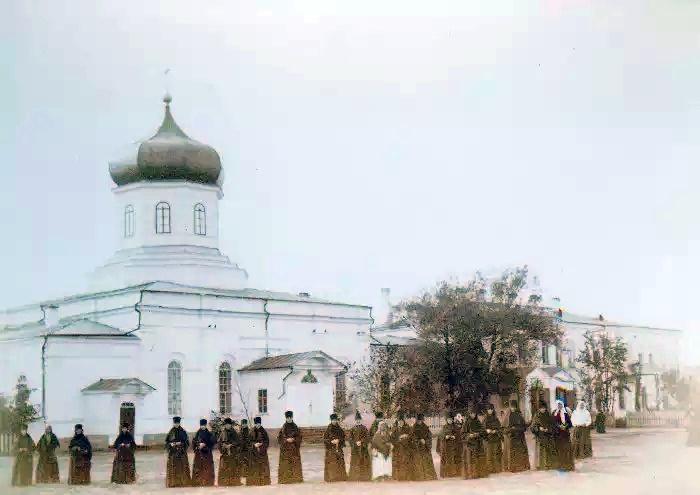 Троицкий собор Тихвинского Борогодицкого монастыря в Бузулуке. Видно соединение с игуменским корпусом